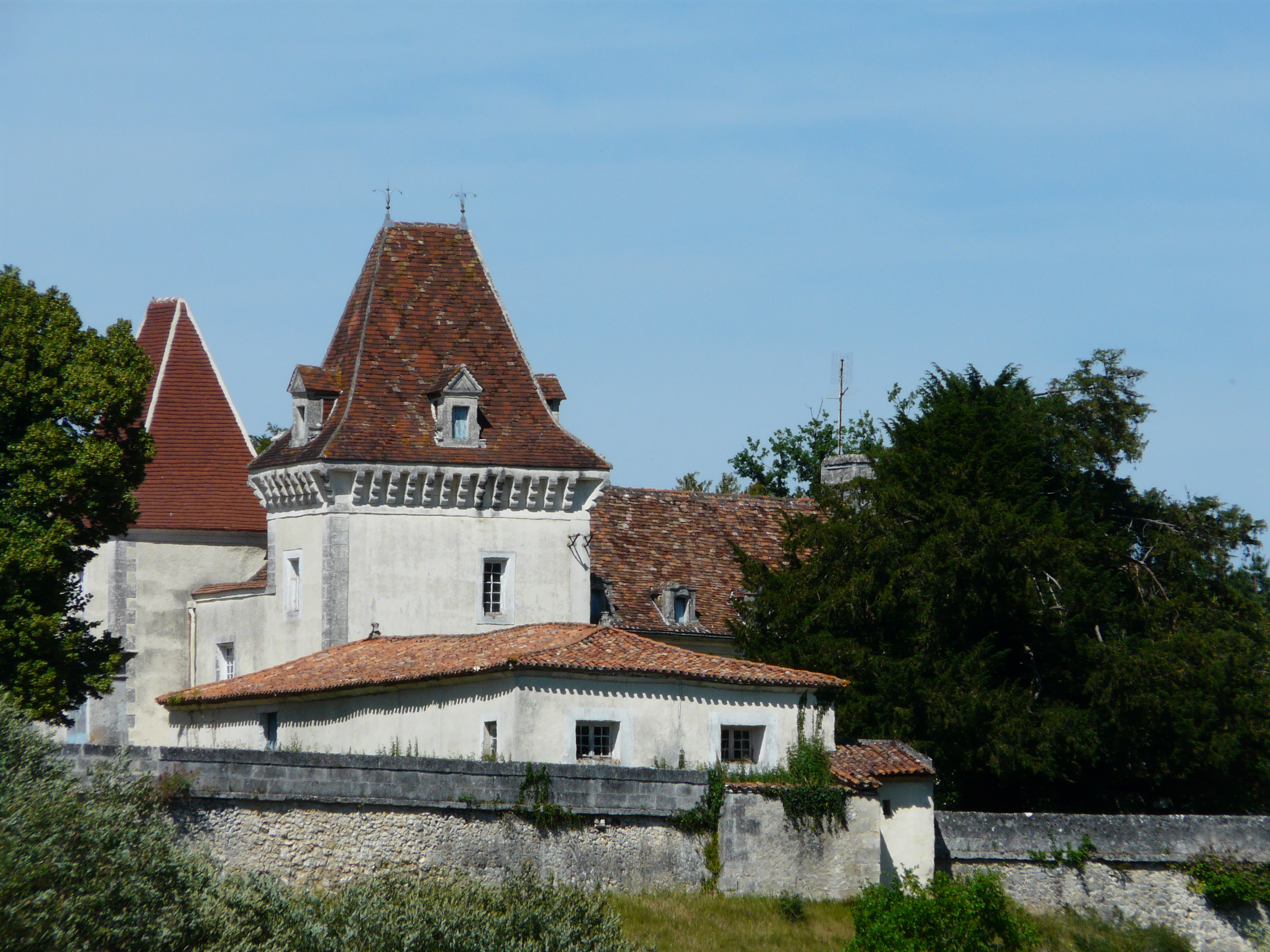 Le château de Fongrenon vu depuis le sud-ouest, Cercles, Dordogne, France.